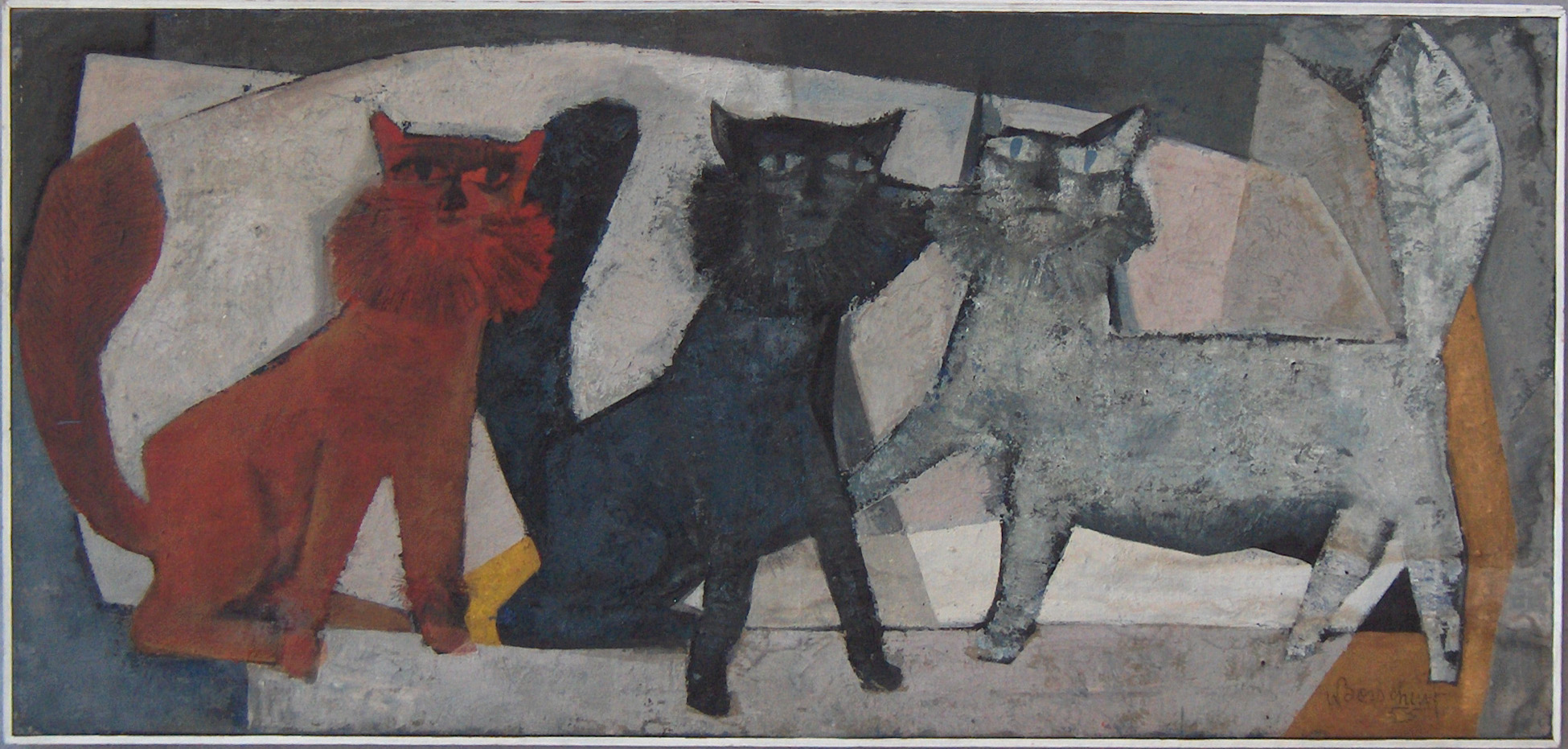 Drie katten 1955 Tempera op doek 70 x 145